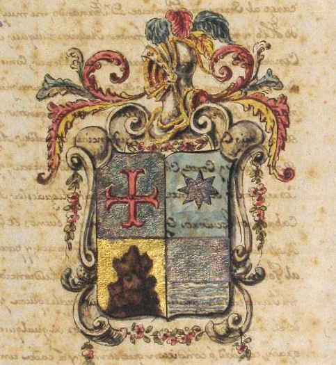 Armes de Francesc de Roca i Batlle, fill de Joaquim de Roca y de Clarà.